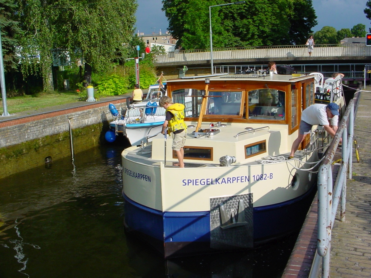 Schleuse Zehdenick